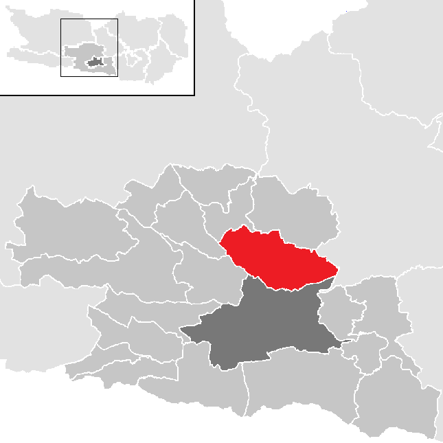 Bezirk Villach-Land